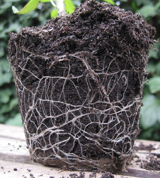 zelfgemaakte foto van wortelstelsel tomaat